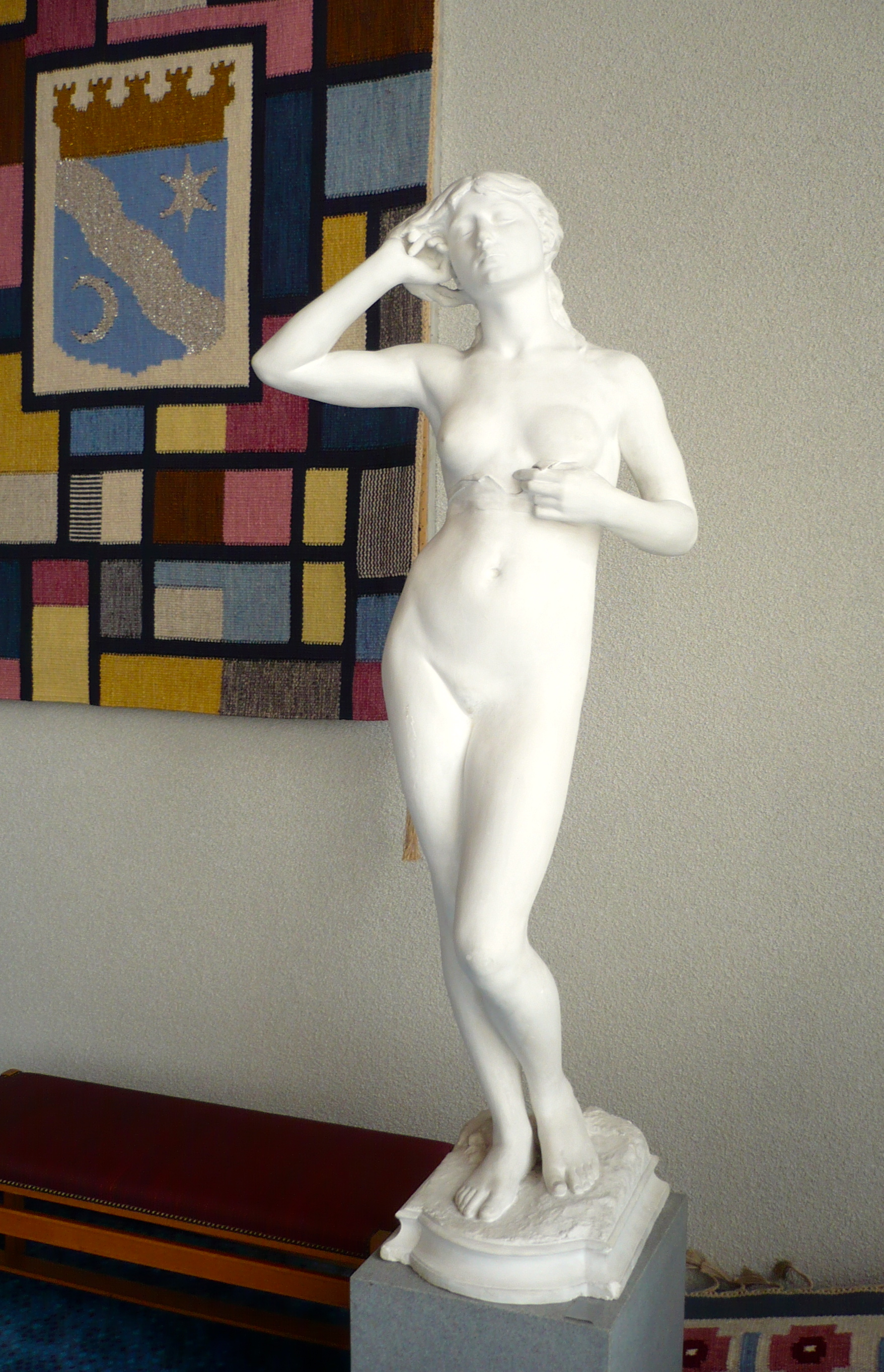 Snöklockan i gips är utförd av Per Hasselberg och donerad till Ronneby stad av Hasselbergs släkt. Verket är placerat i Ronneby stadshus.